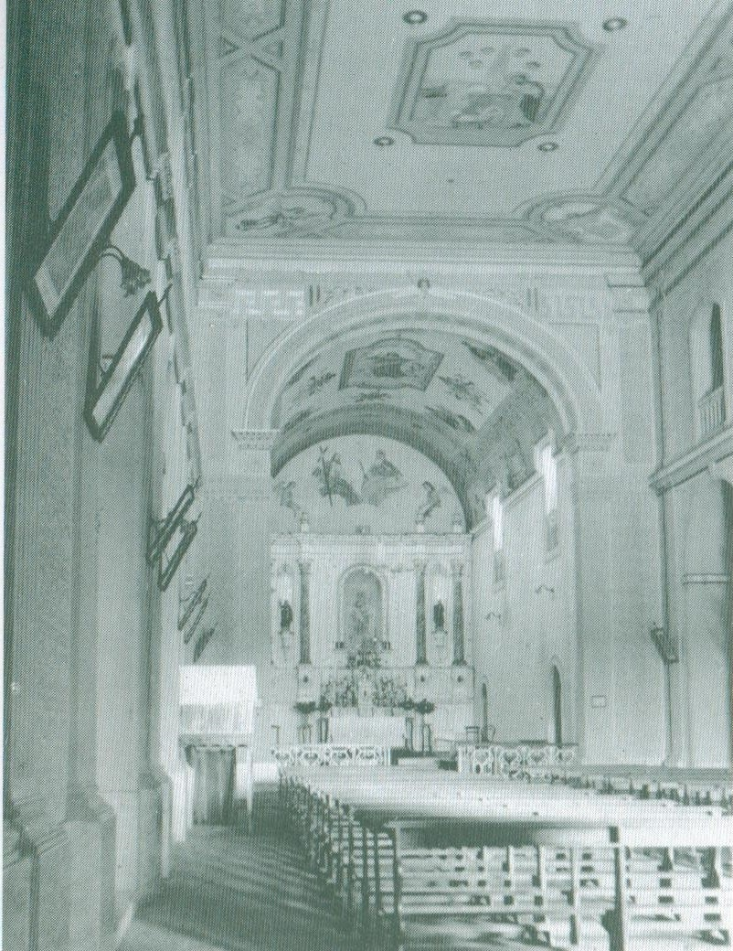 Típico interior neo-clássico com paredes pintadas á moda dos salões europeus da década de 20. Os três grandes lustres de cristal já não estão mais. O antigo arco romano tornou-se neo-clássico. Surgem mais dois altares laterais, no lugar de antigas portas. O piso já não é mais de assoalho, mas de ladrilhos. (1930)